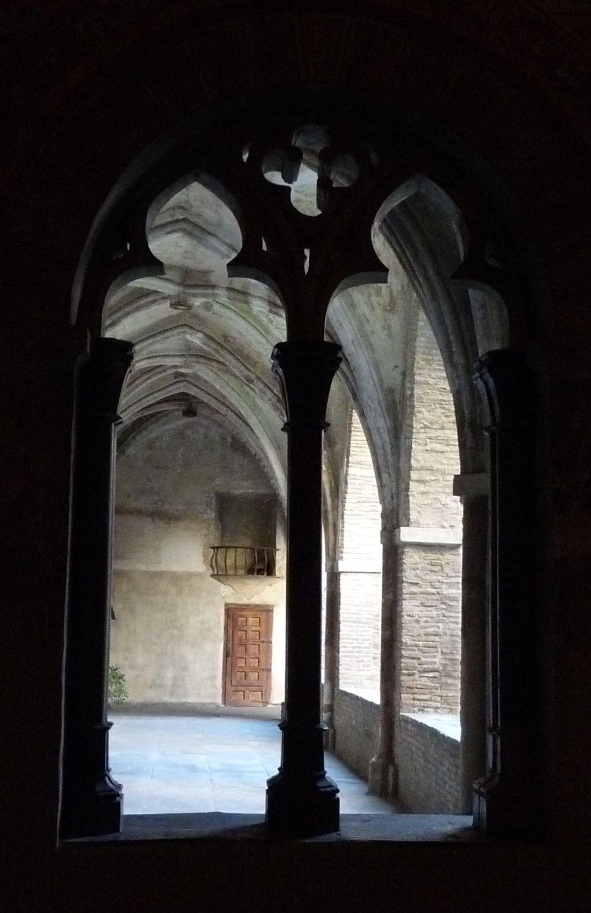 Zaragoza - Convento del Santo Sepulcro s. XIII-XIV - Sala capitular - Ventana hacia el claustro